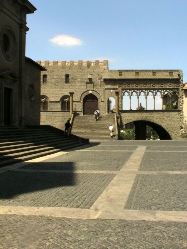 Viterbo, Lazio, Italia